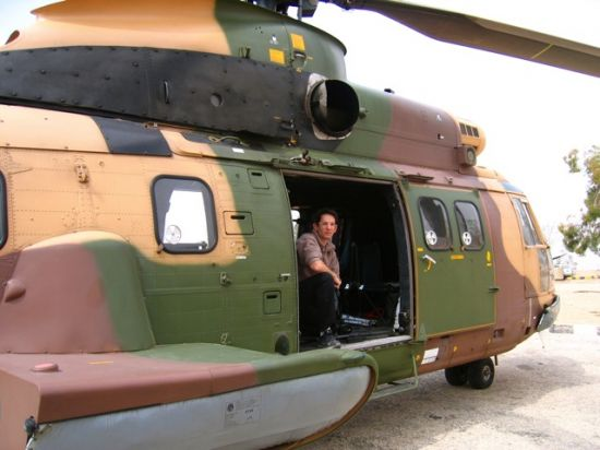 Jordanie, avant le survol de Petra